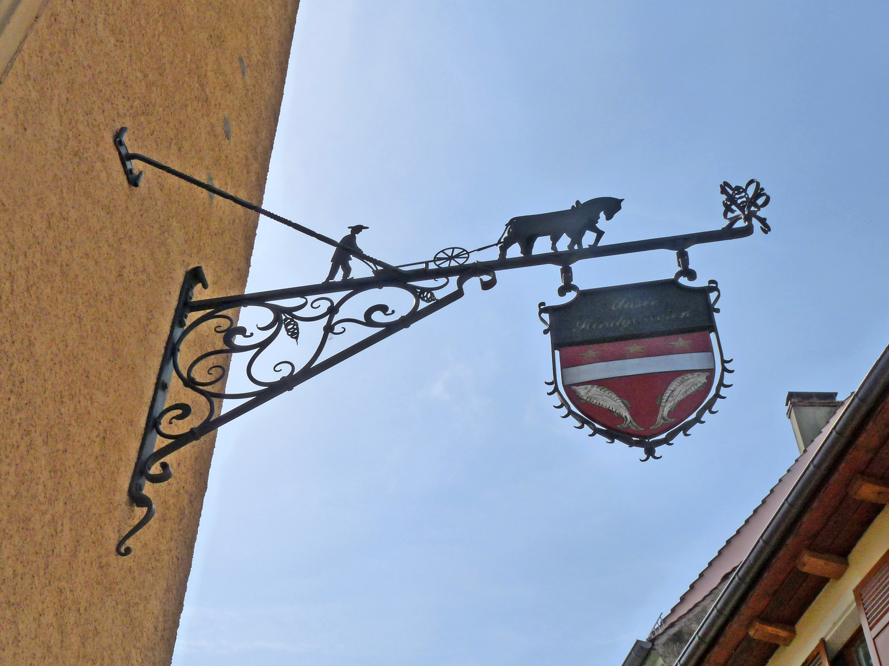 Altkirch (Haut-Rhin) : Musée sundgauvien (enseigne)